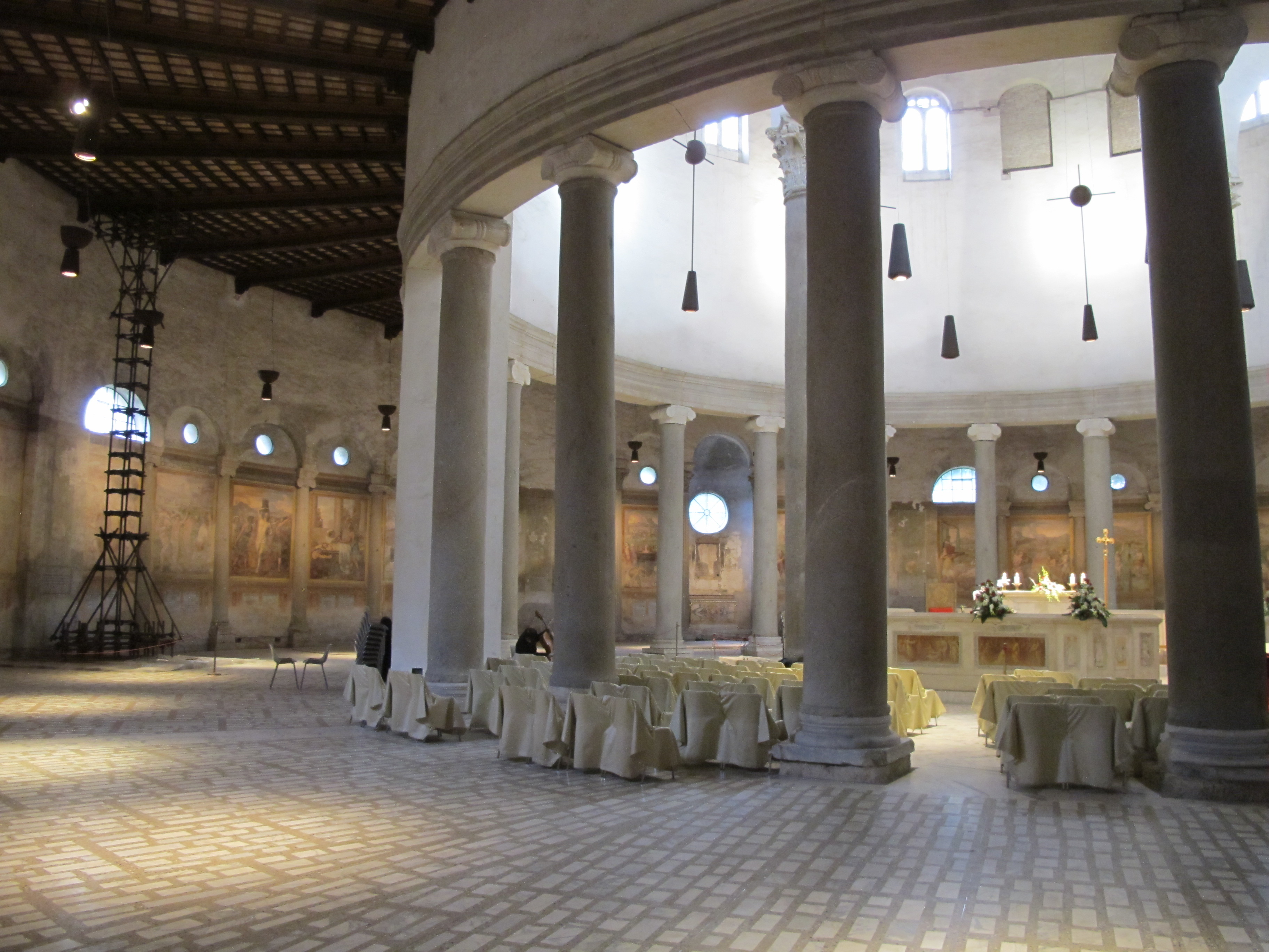 roma, santo stefano rotondo